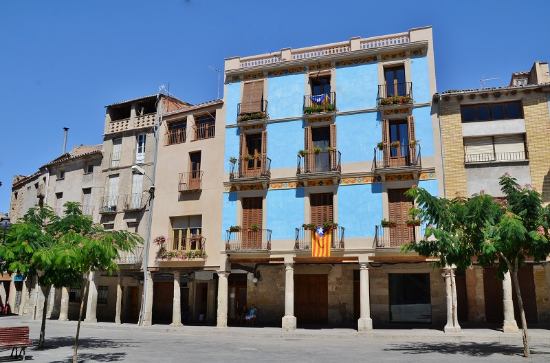 Porxos de la plaça Major (Santa Coloma de Queralt)